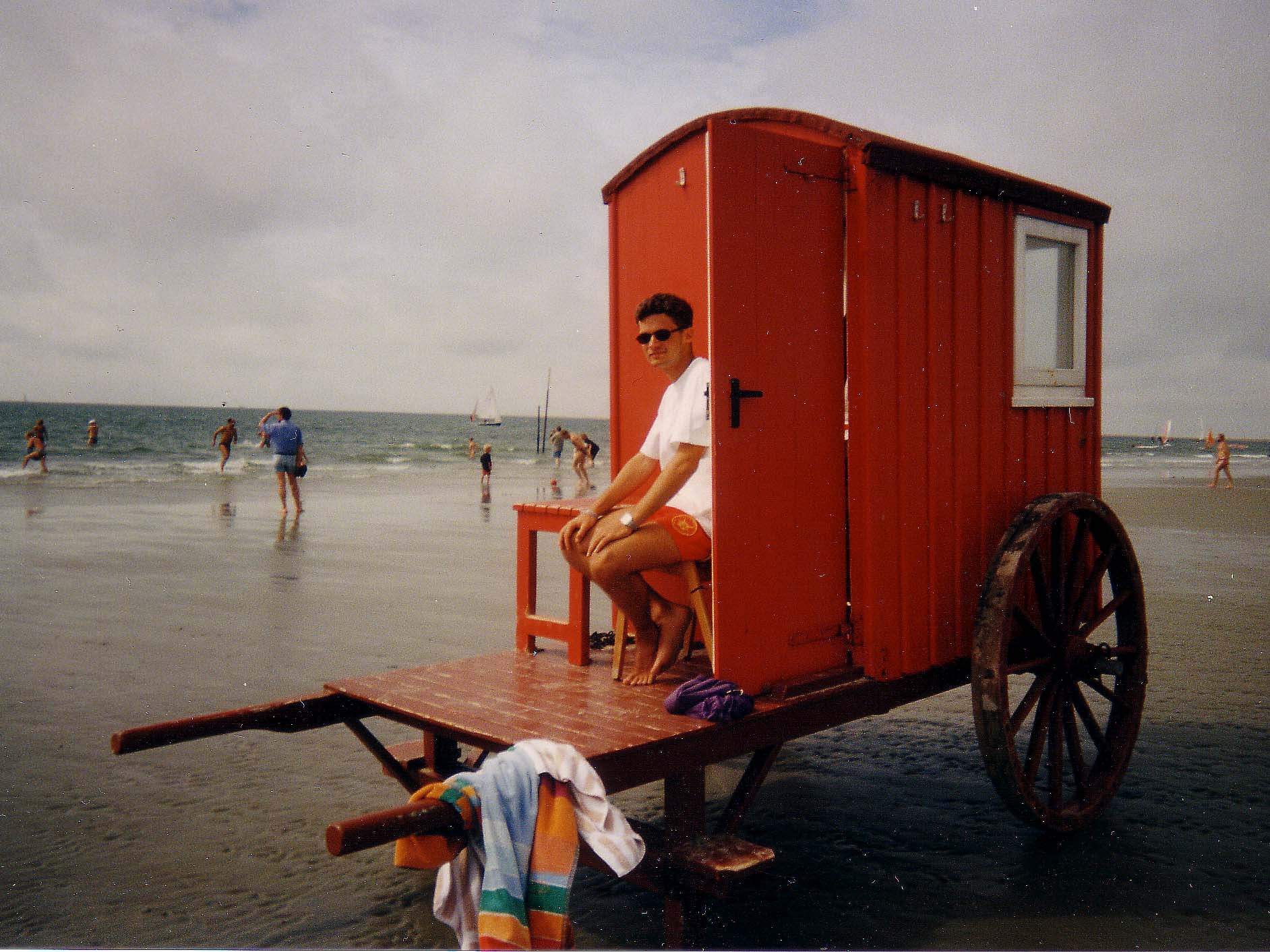 Beschreibung: DLRG-Rettungsschwimmer auf der Nordseeinsel Borkum Quelle: selber fotografiert Fotograf: Lorenz Teschner Datum: August 1998